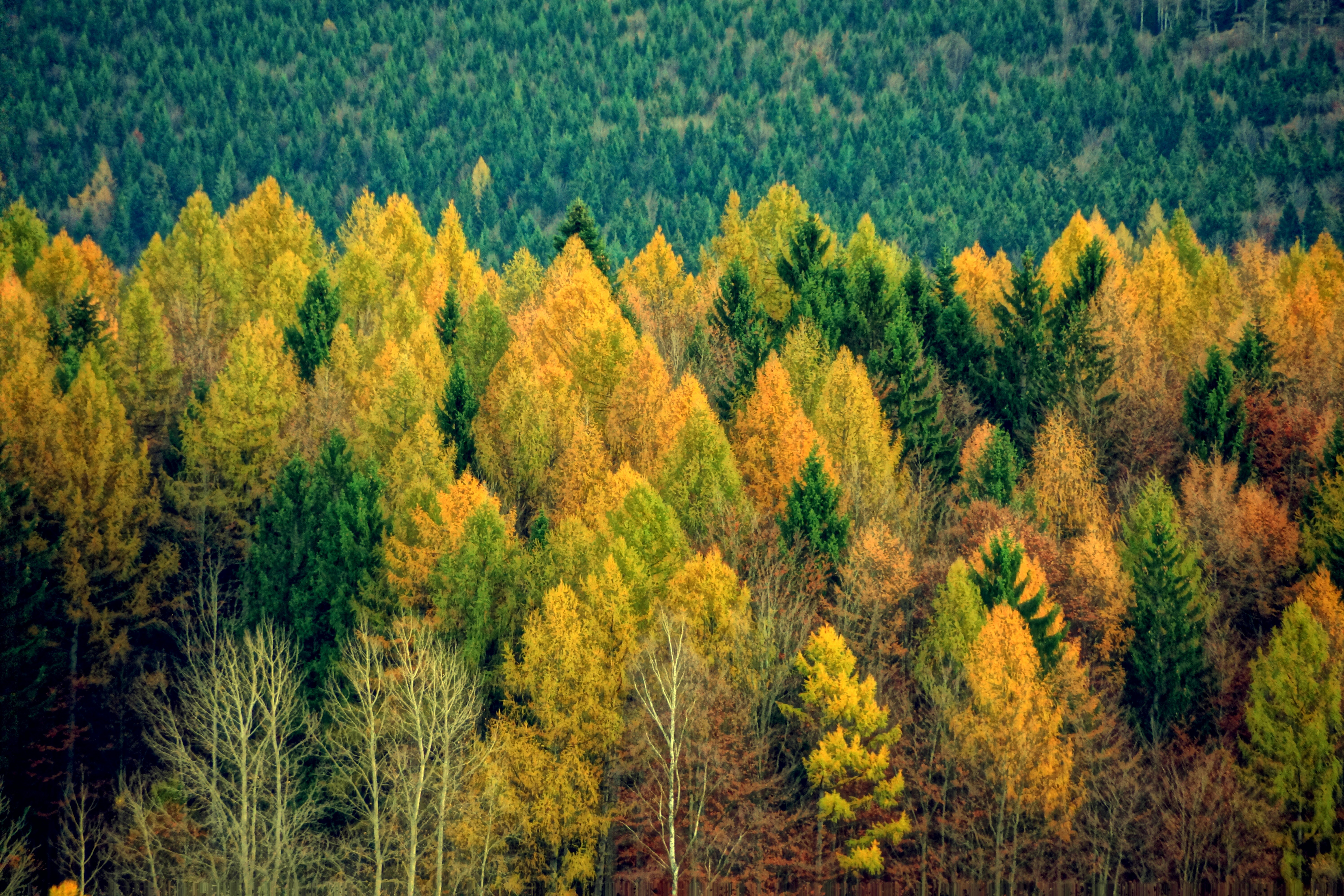 autumn forest